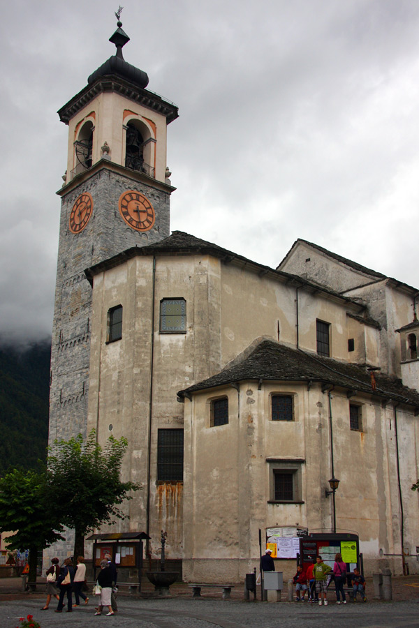 Lato absidale della chiesa parrocchiale di Santa Maria Maggiore (VB)